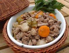 Photo du Ragout de soja Auteur : Avea Je suis l'auteur de la photo